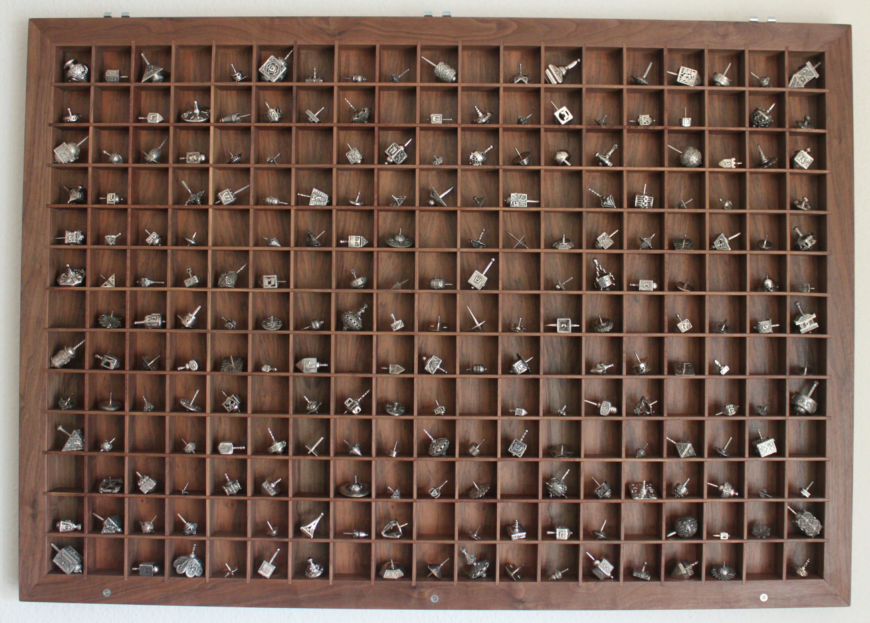 Sammlung von silbernen Dreideln